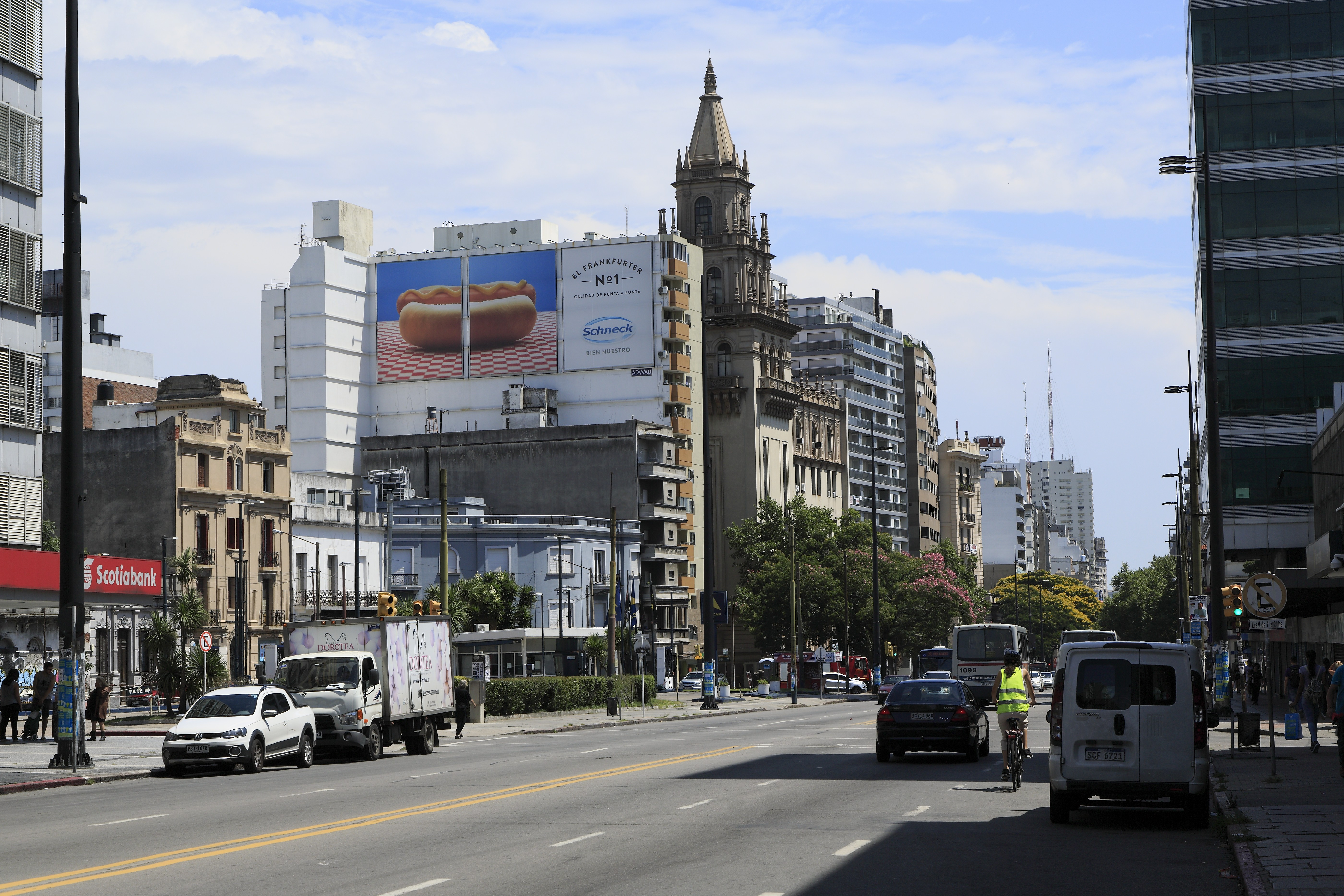 Eine der großen Achsen in Montevideo, bei der Größe der Stadt ist es erstaunlich, dass es außer einem Busnetz keinen neuzeitlichen Nahverkehr gibt. Zur Agglomeration kommt hinzu, dass die Küste bis hinter Punta del Este praktisch durchgehend bebaut und besiedelt ist.